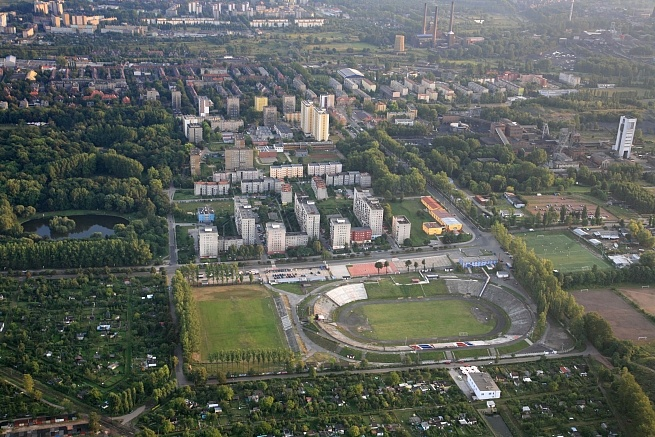 Bytom z lotu ptaka - stadion Polonii Bytom.